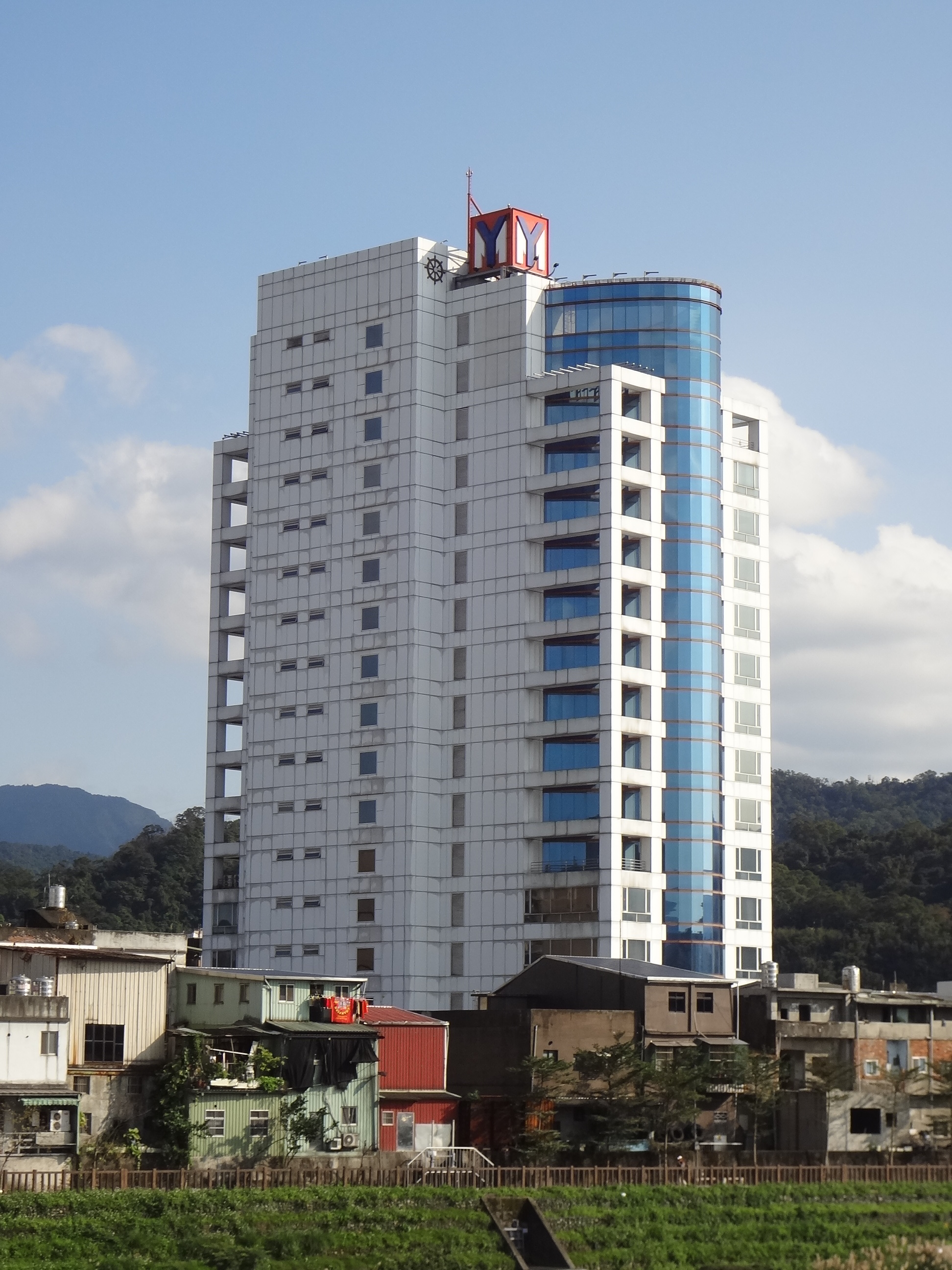 陽明海運總部，地址：基隆市七堵區明德一路271號。拍攝地點：基隆市七堵區七賢橋人行道。